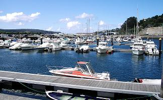 Vista do porto deportivo de Viveiro, tomada co fondo de Celeiro. Obtida por user:Agremon o 31/07/05 Uploaded by User:Agremon